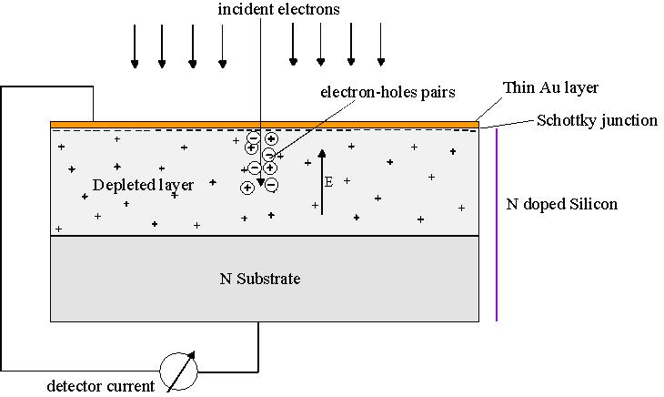 Solid sate electron detector